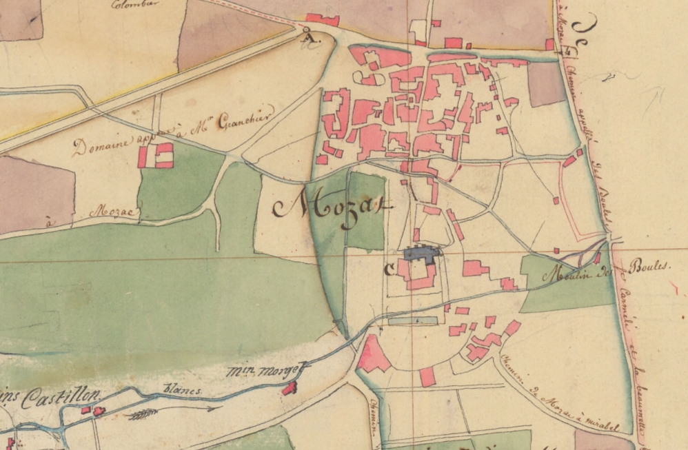 Extrait du «Tableau d'assemblage du plan cadastral parcellaire de la commune de Mozat canton de Riom arrondissement de Riom département du Puy-de-Dôme, terminé sur le terrain le 24 juin 1809, sous l'administration de Monsieur le Baron Ramond préfet, M. Rougier maire, et sous la direction de M. Lefour directeur des contributions, M. Lesueur ingénieur vérificateur, par M. Cariat géomètre du cadastre ». Échelle : 1 cm = 5000 m